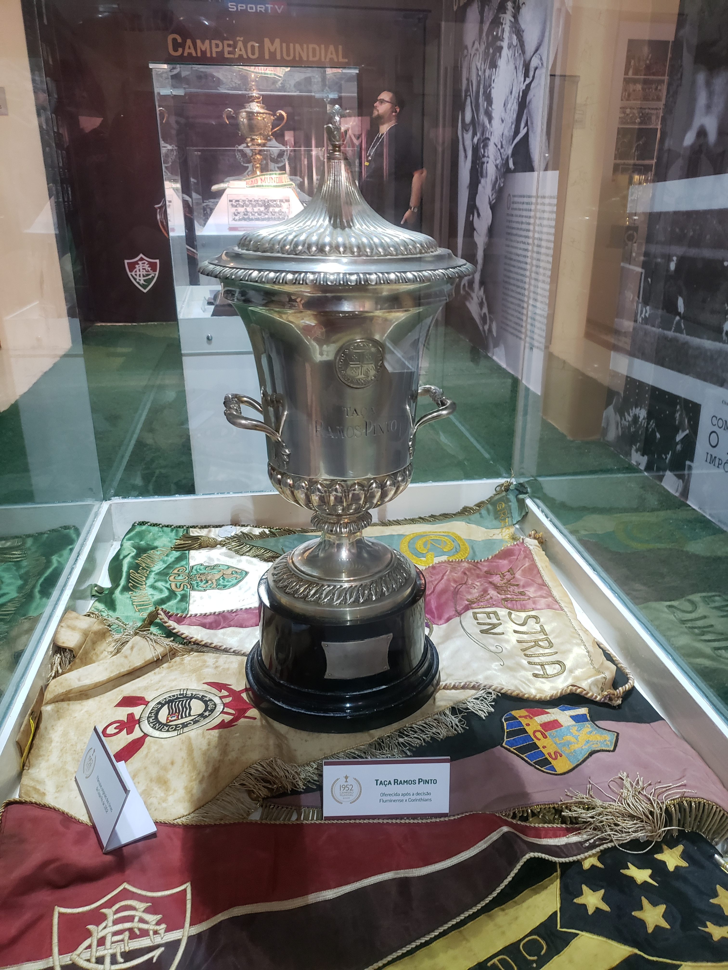 Taça Ramos Pinto conquistado pelo Fluminense Football Club contra o Sport Club Corinthians Paulista na decisão da Copa Rio de 1952.